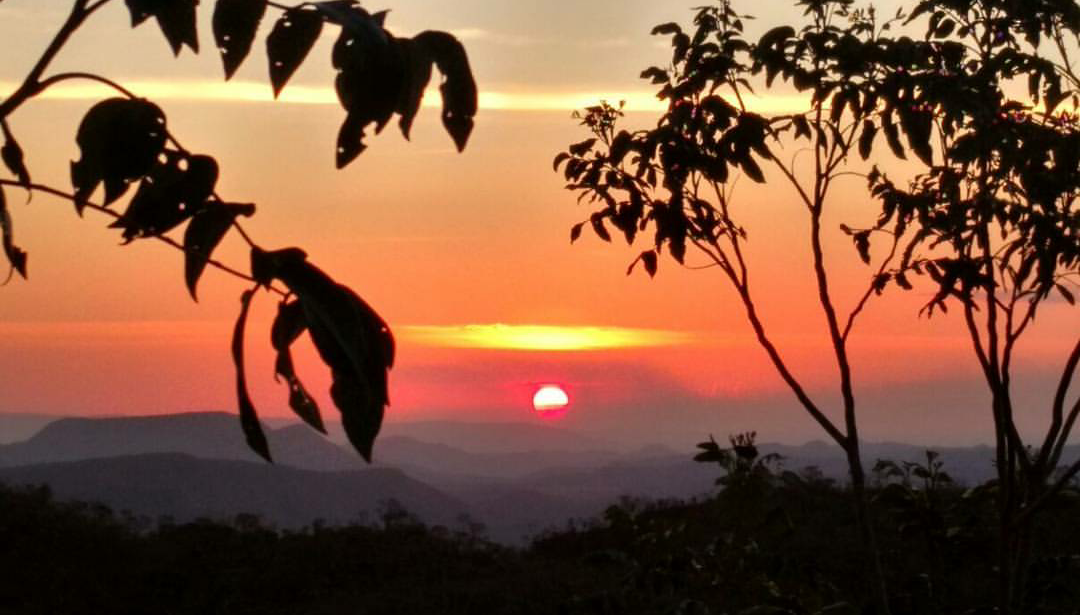 Pôr-do-sol em São Jorge